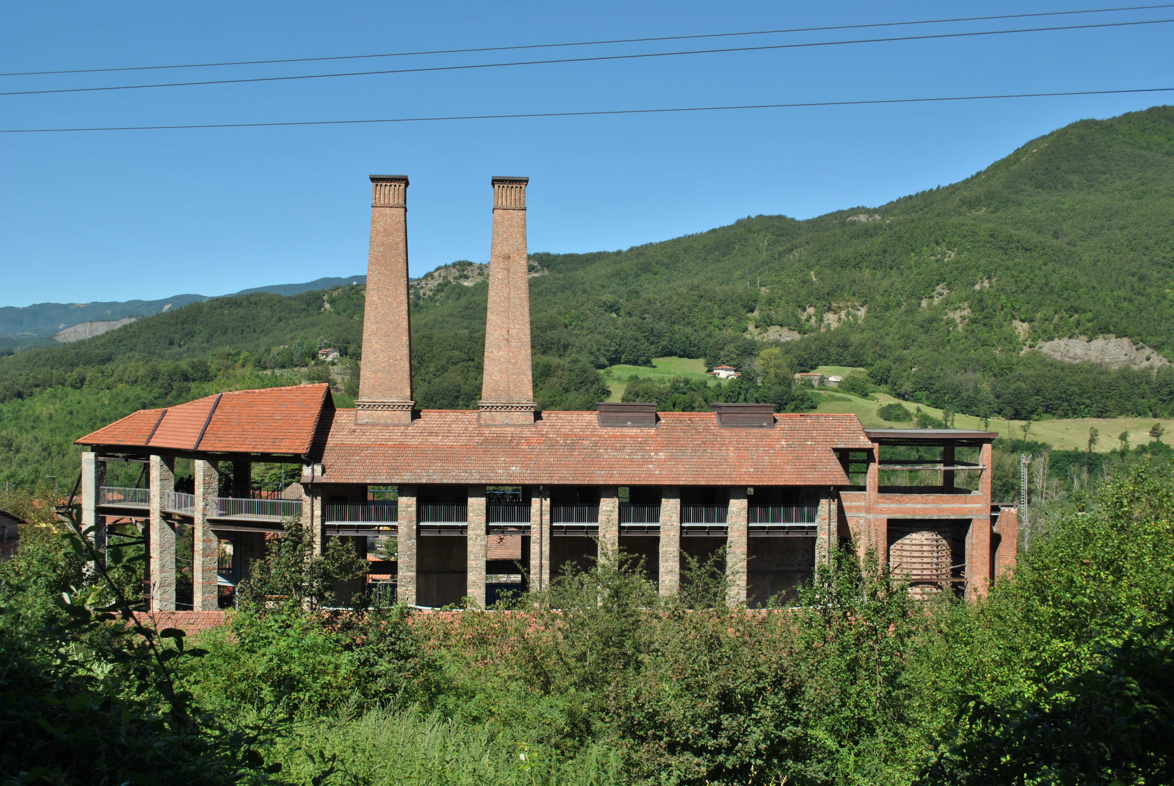 L’ex Cementificio Marchino di Ghiare di Berceto (PR) era un complesso produttivo costruito sul versante est del torrente Taro dalla Società Anonima Marchino e C. costruito nel 1911